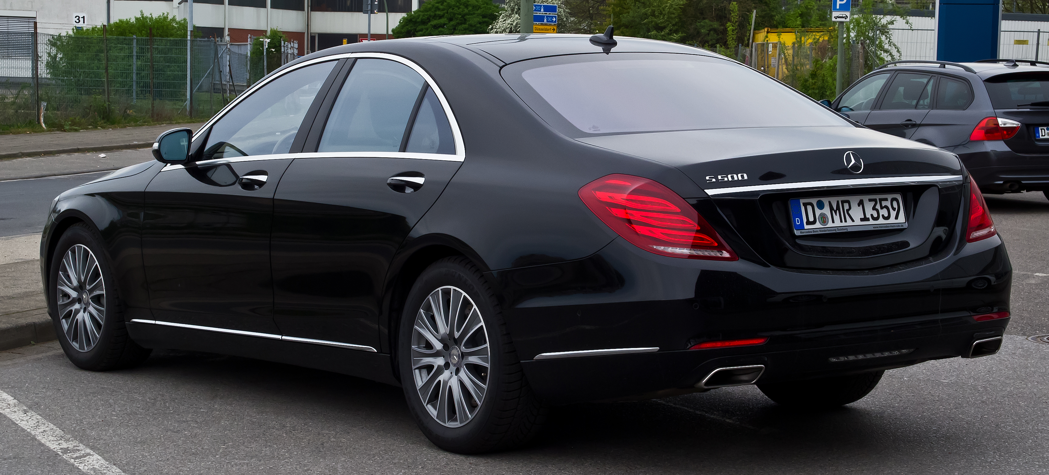 Mercedes-Benz S 500 (W 222)